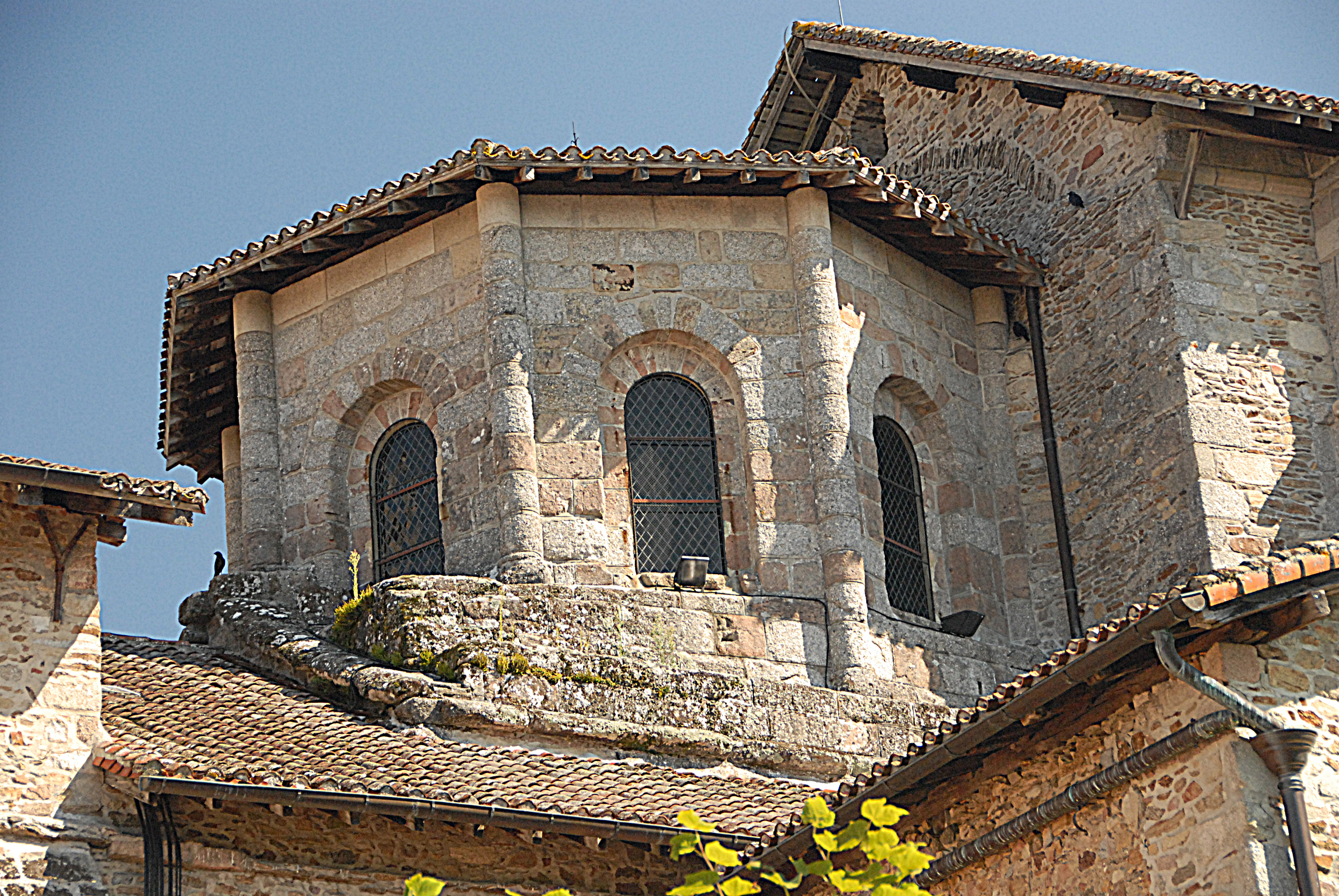 Stiftskirche St.-Léonard-de-Noblat, Vierungslaterne von S